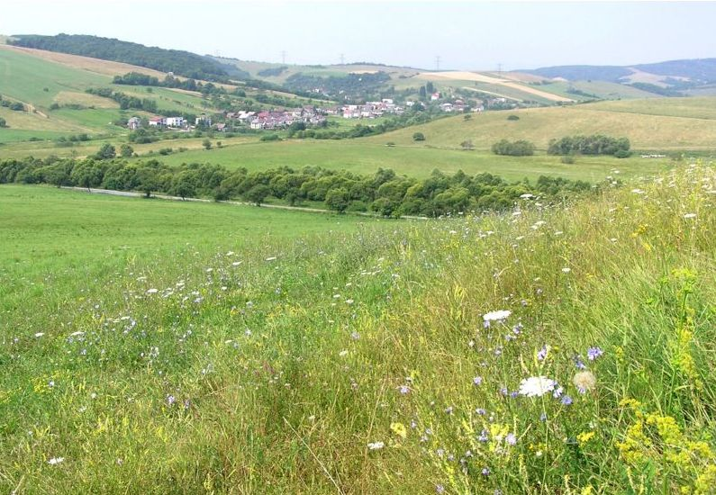 Celkový pohľad